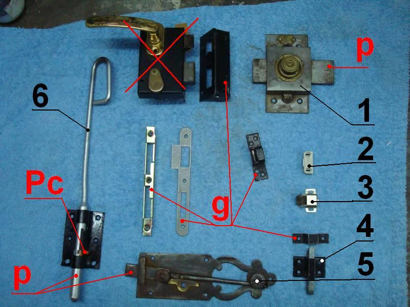 Photo de différents verrous-loqueteaux-targettes